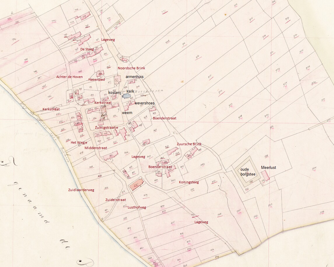 Bewerkte kadastrale minuut van Noordlaren